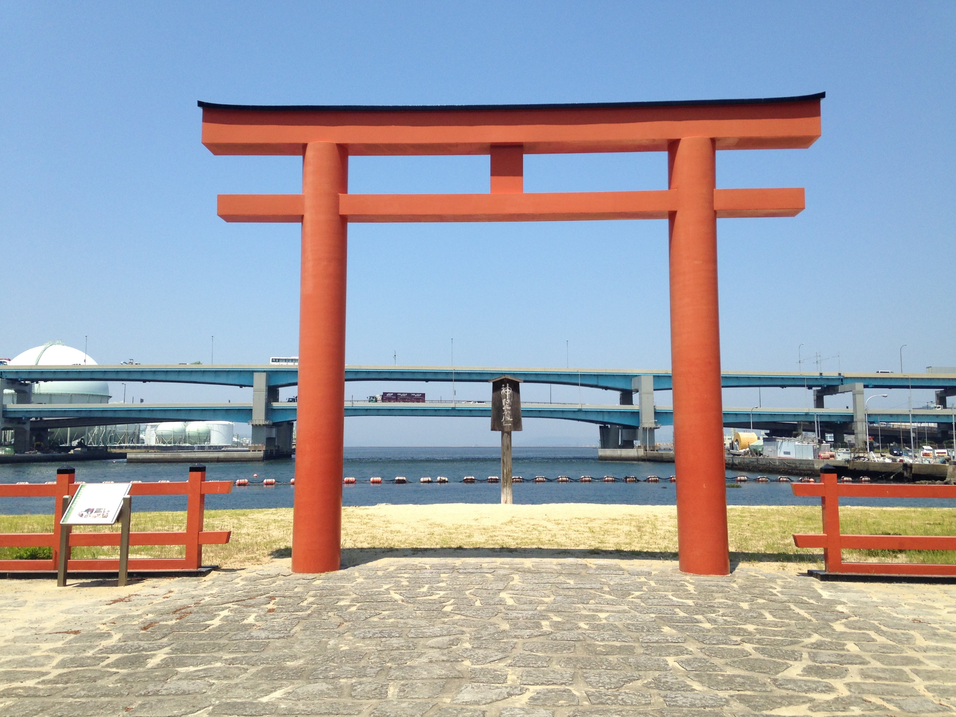 筥崎宮の浜鳥居